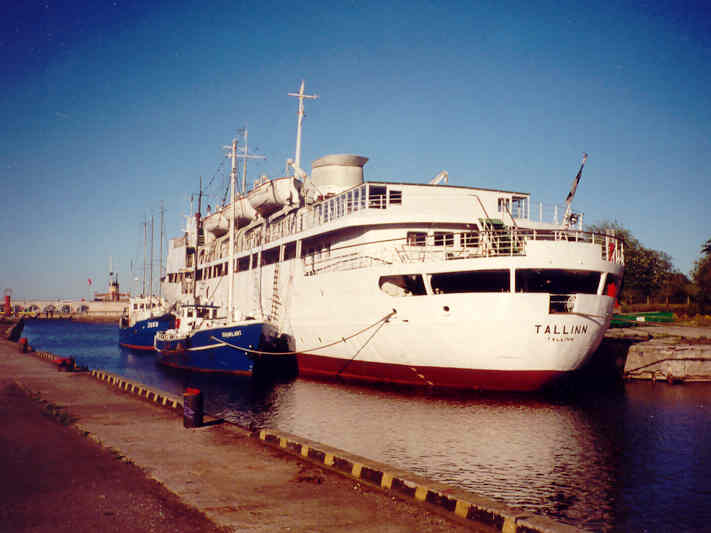 Tallinn (ehitatud 1960) Kalasadamas (Suur Tõll tagaplaanil)